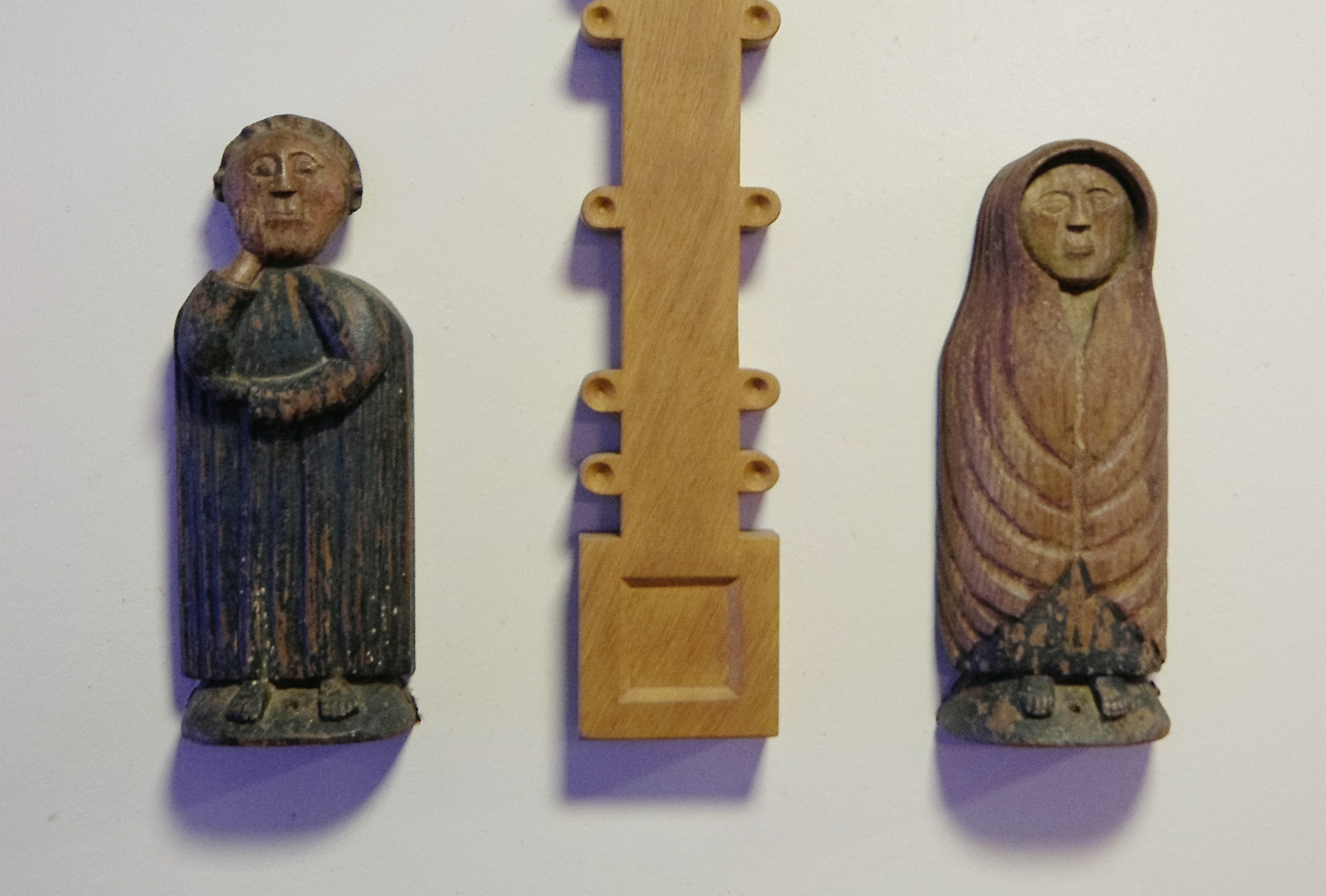 St. Annen zu Taarstedt, Kreis Schleswig-Flensburg. Maria und Johannes unter dem Kreuz